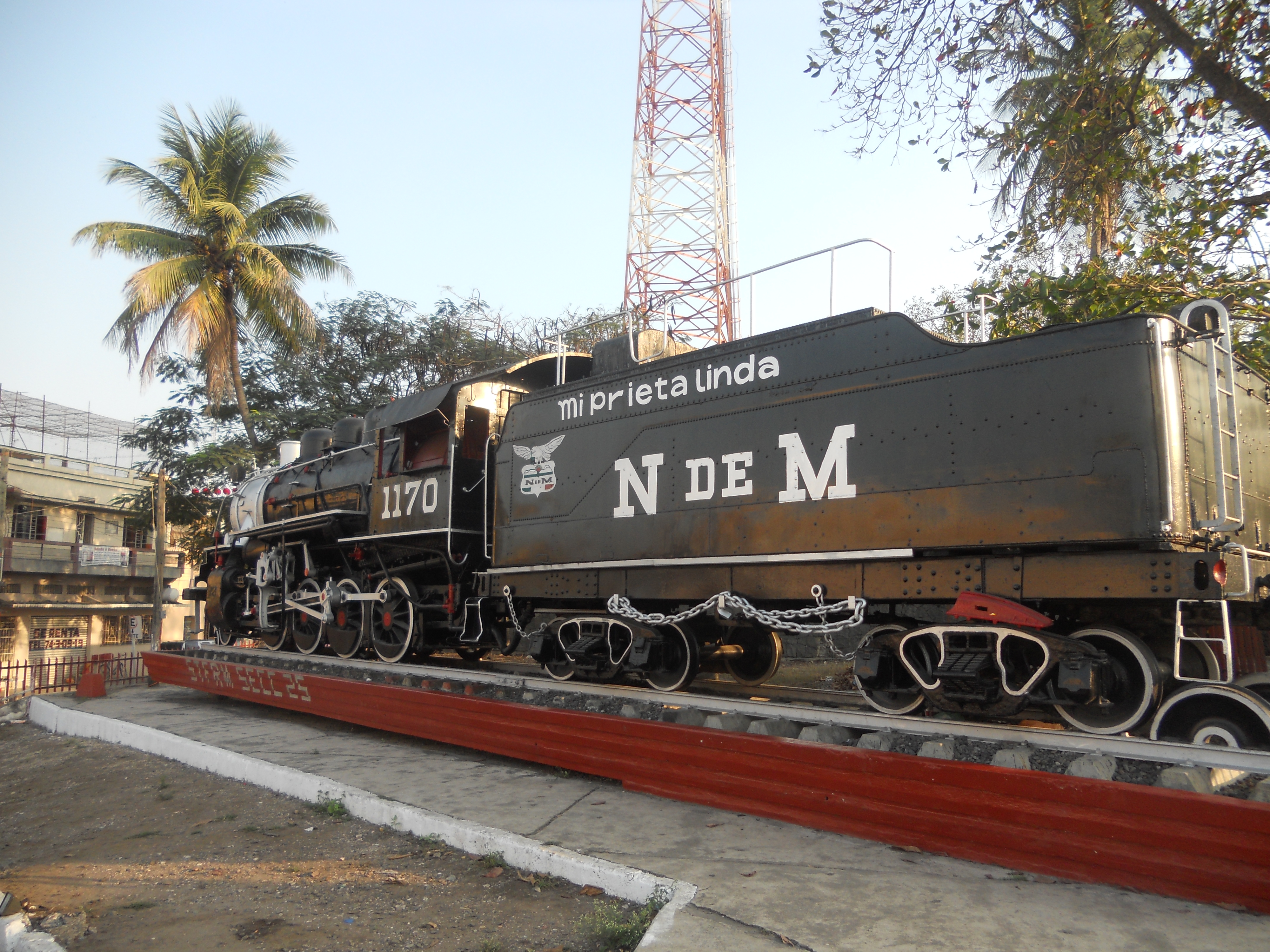 Toma del la locomotora en homenaje a los ferrocarriles que le dieron realce a la población de Tierra Blanca